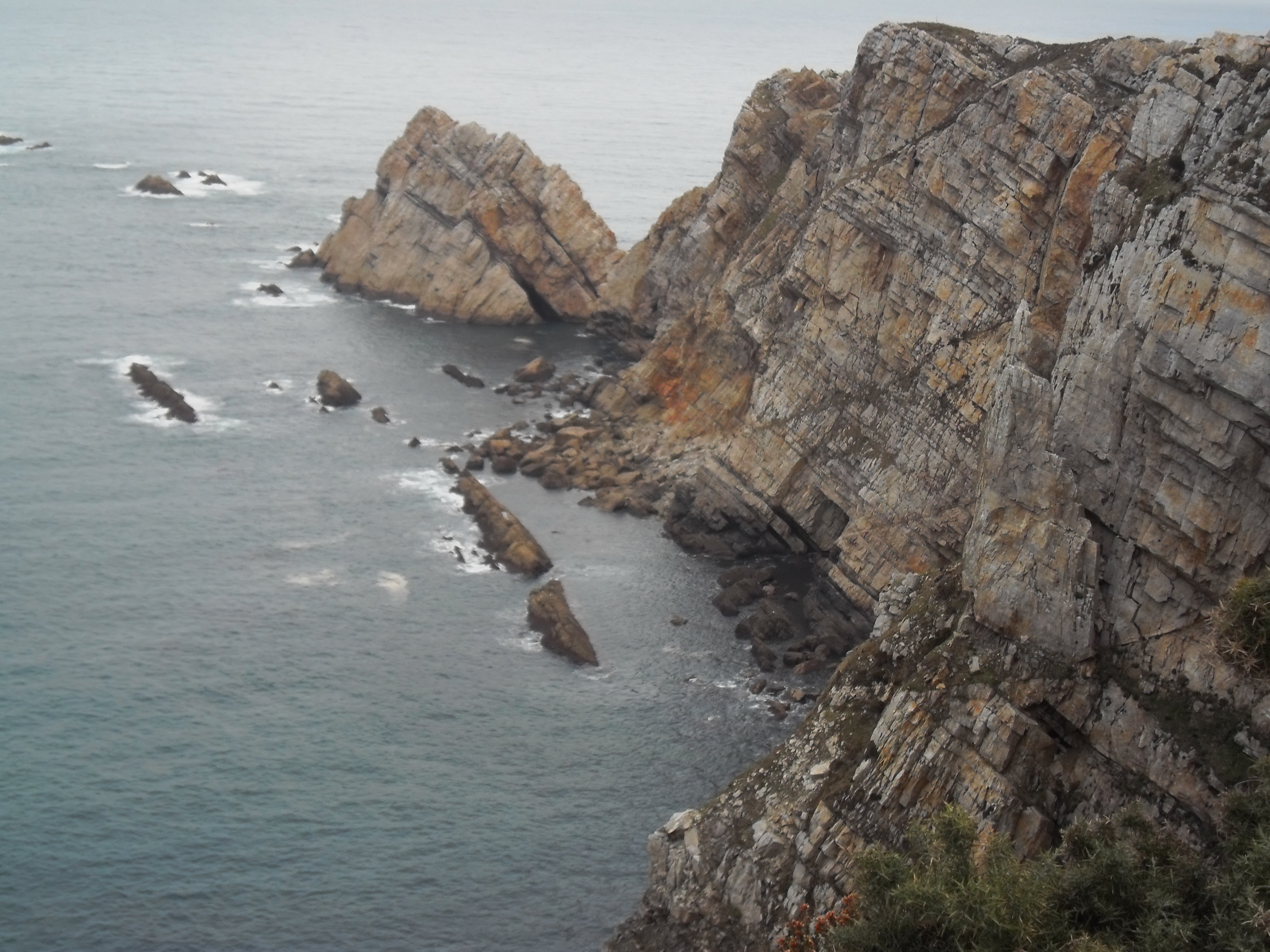 Blick auf das Cabo de Penas